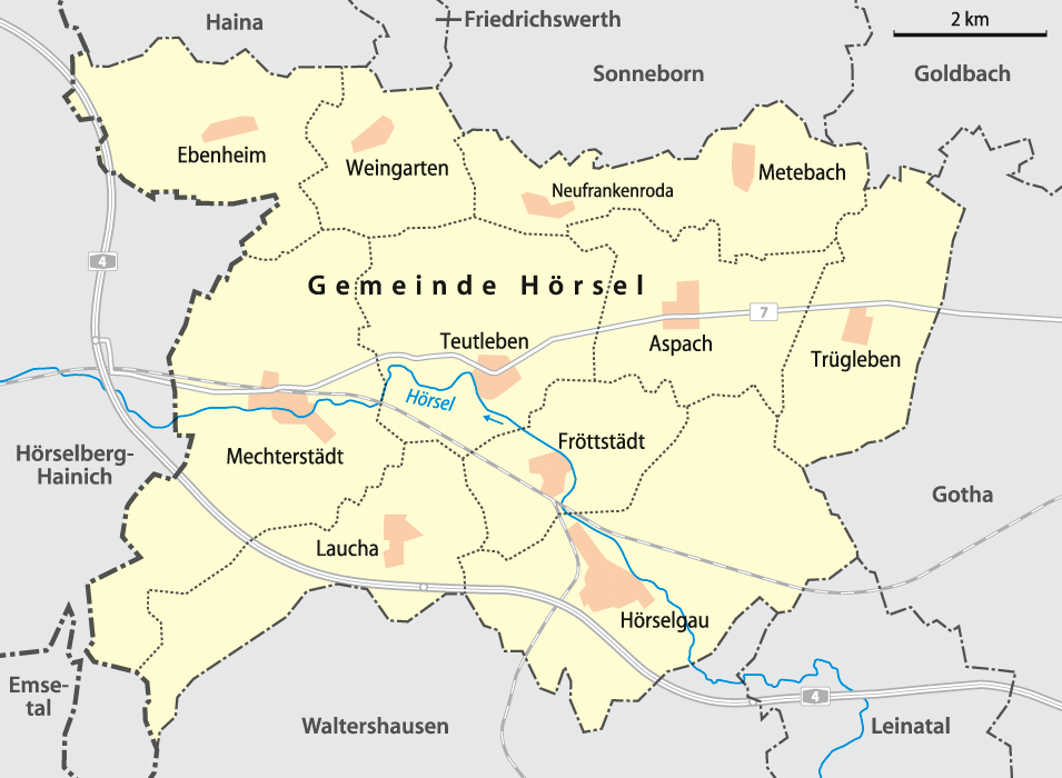 Karte der Ortsteile der Gemeinde Hörsel